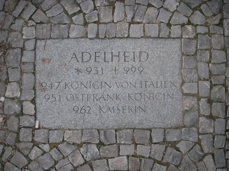 Der Weg der Ottonen: Adelheid Fotografiert am Magdeburger Domplatz.